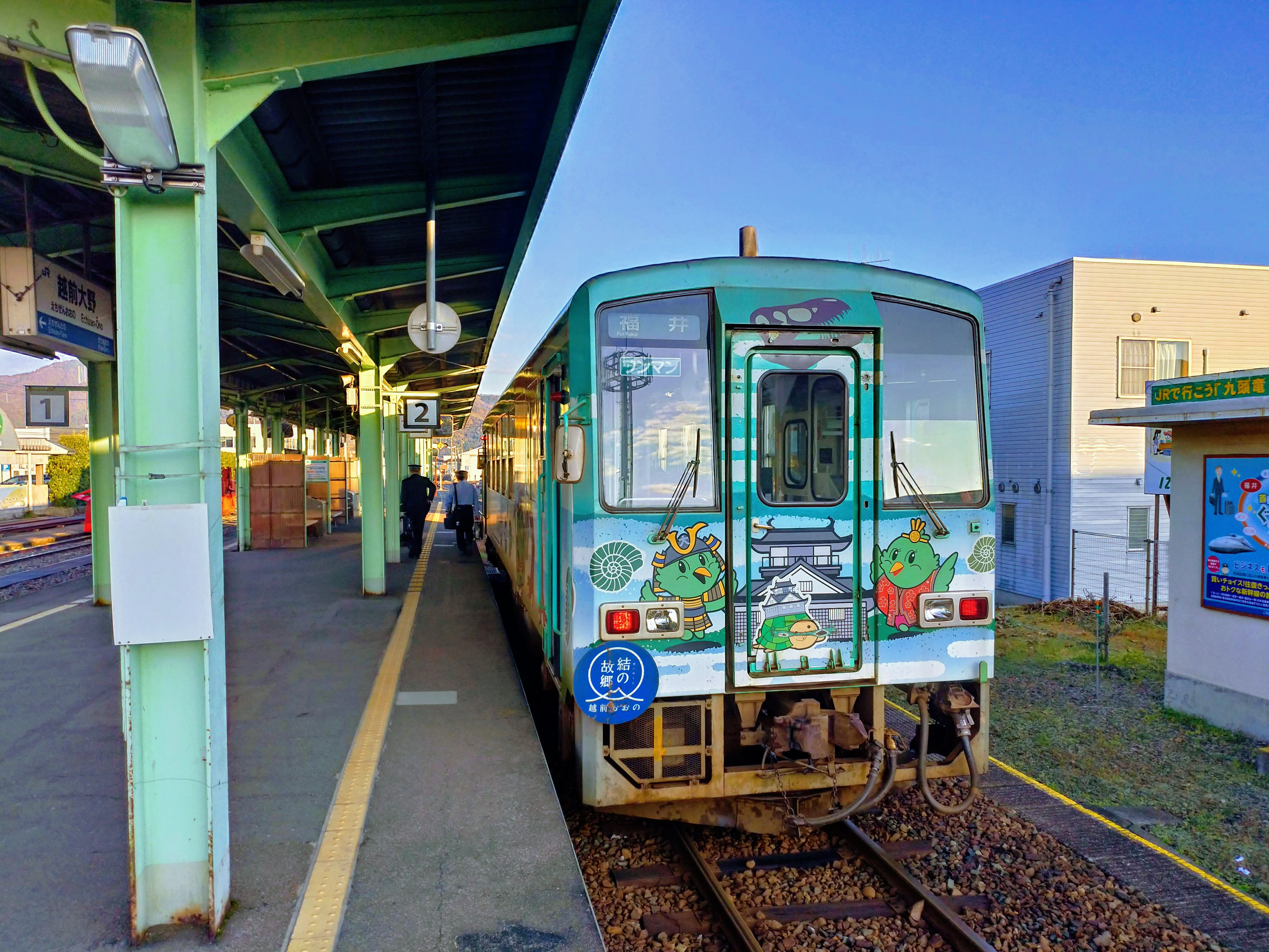 JR西日本 越美北線 越前大野駅(福井県大野市)